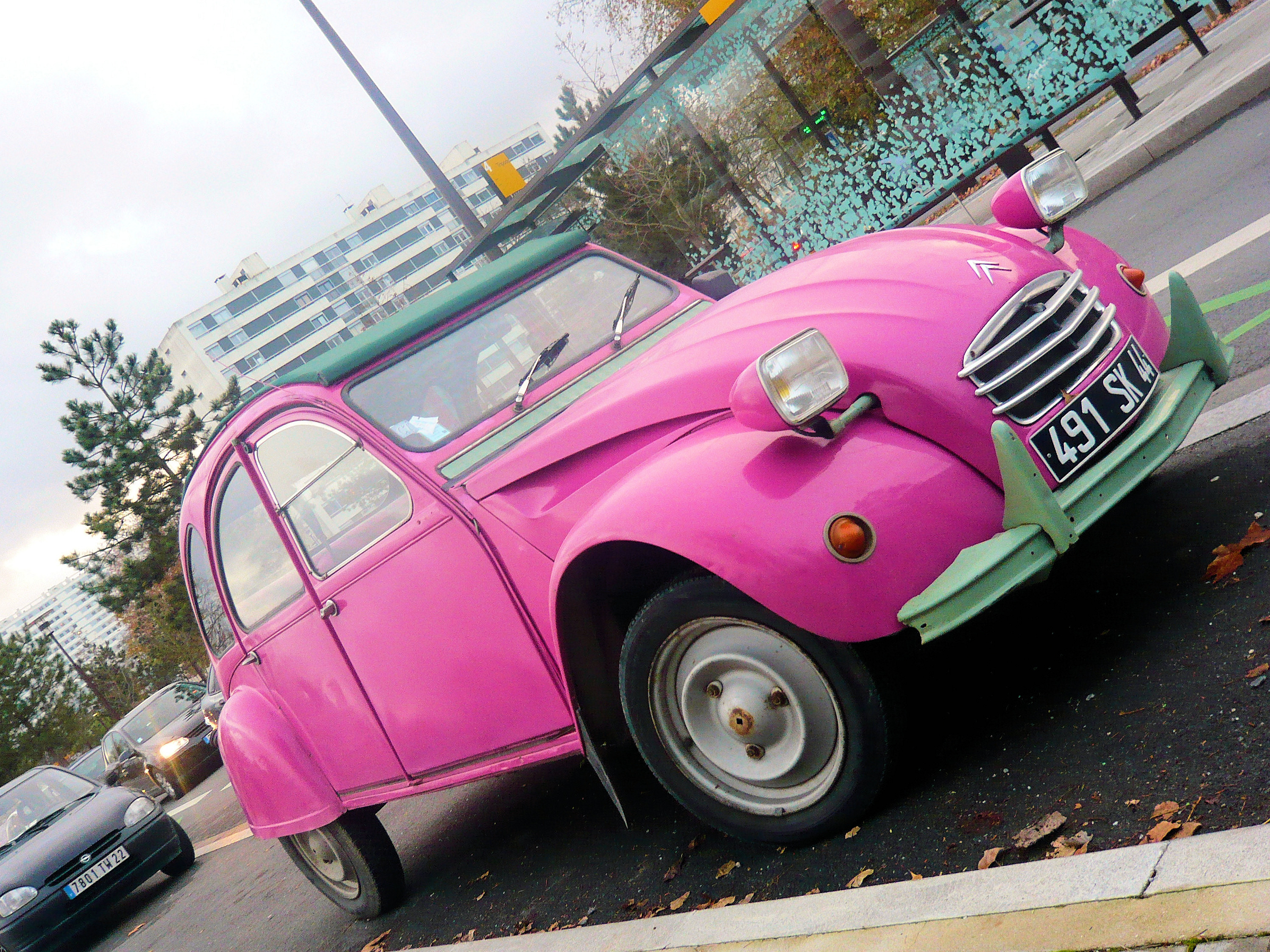 Deux-Chevaux Citroën rose